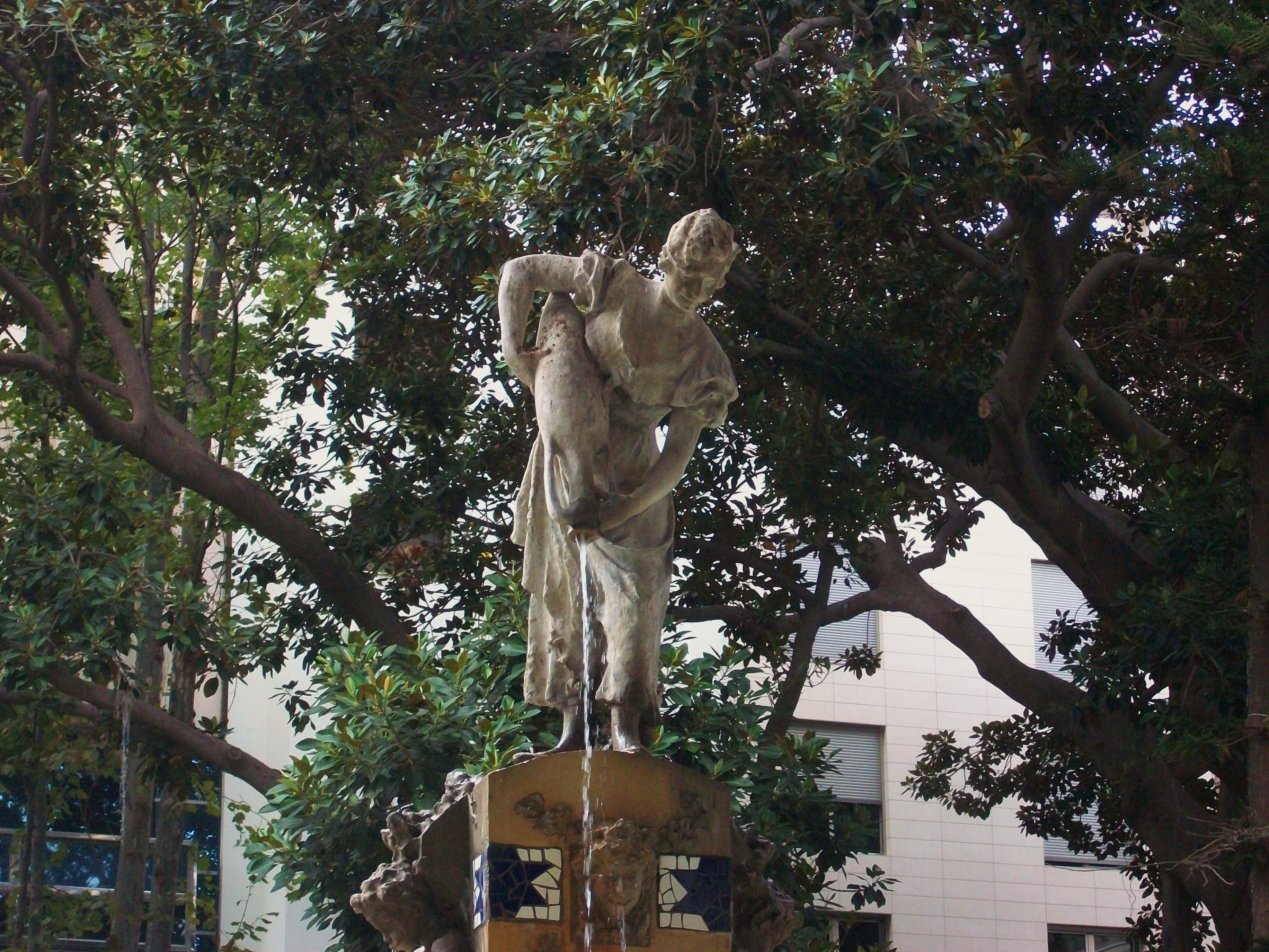 Font de l'Aiguadera (Alacant). Font realitzada per commemorar l'arribada d'aigua corrent des de Saix, el 16 d'octubre de 1898. La font original consistia en el safareig que hui tenim, al centre del qual es disposava el rocall i canyes que ocultaven un sortidor capaç d'elevar l'aigua a gran alçada. El 1918 se n'encarrega l'embelliment a Vicent Bañuls (1866 - 1935), qui va realitzar l'escultura que tenim hui en dia, que simbolitza el triomf del bé sobre el mal, representats per la xicota i el faune.